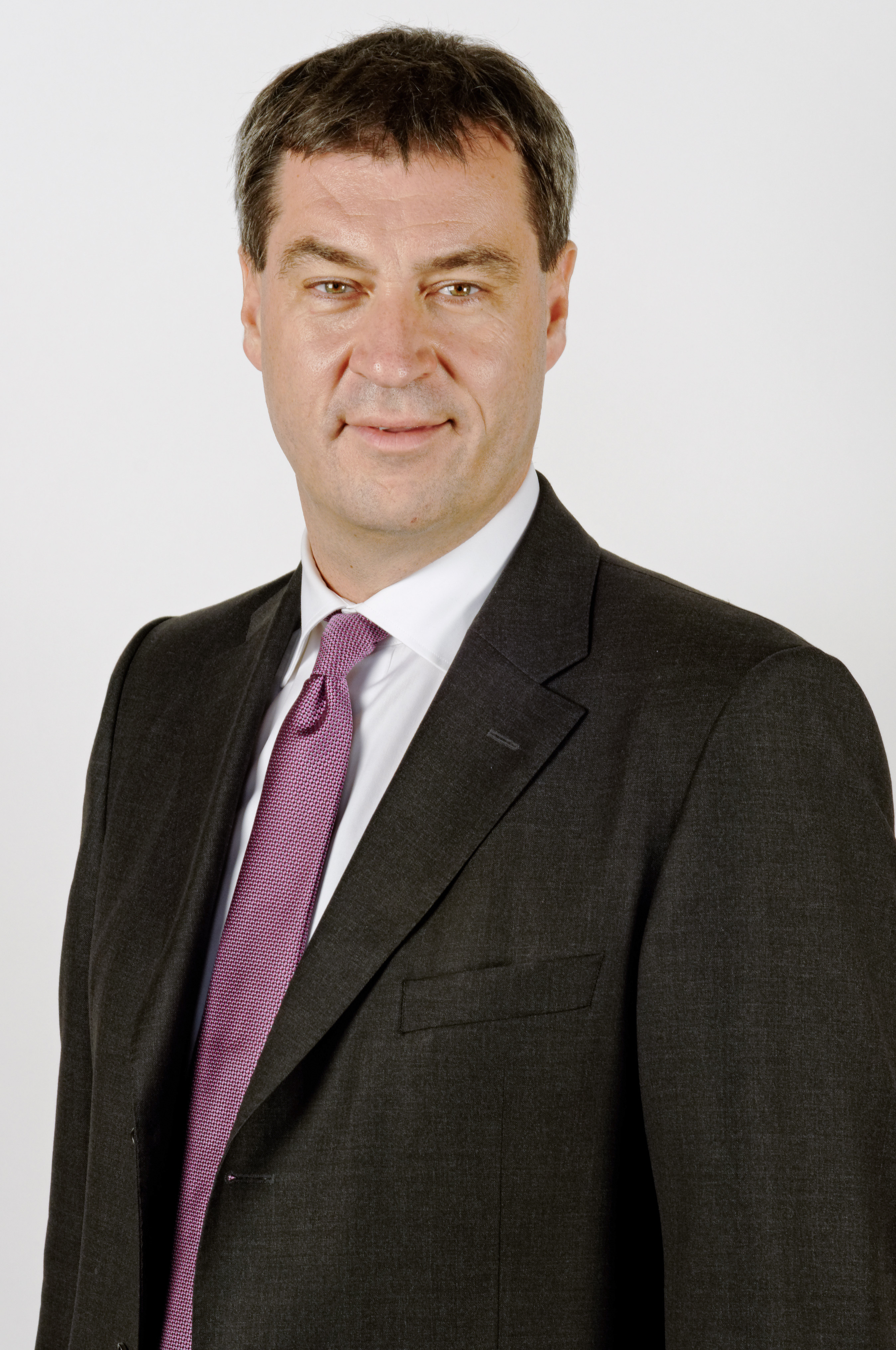 Landtagsprojekt Bayern